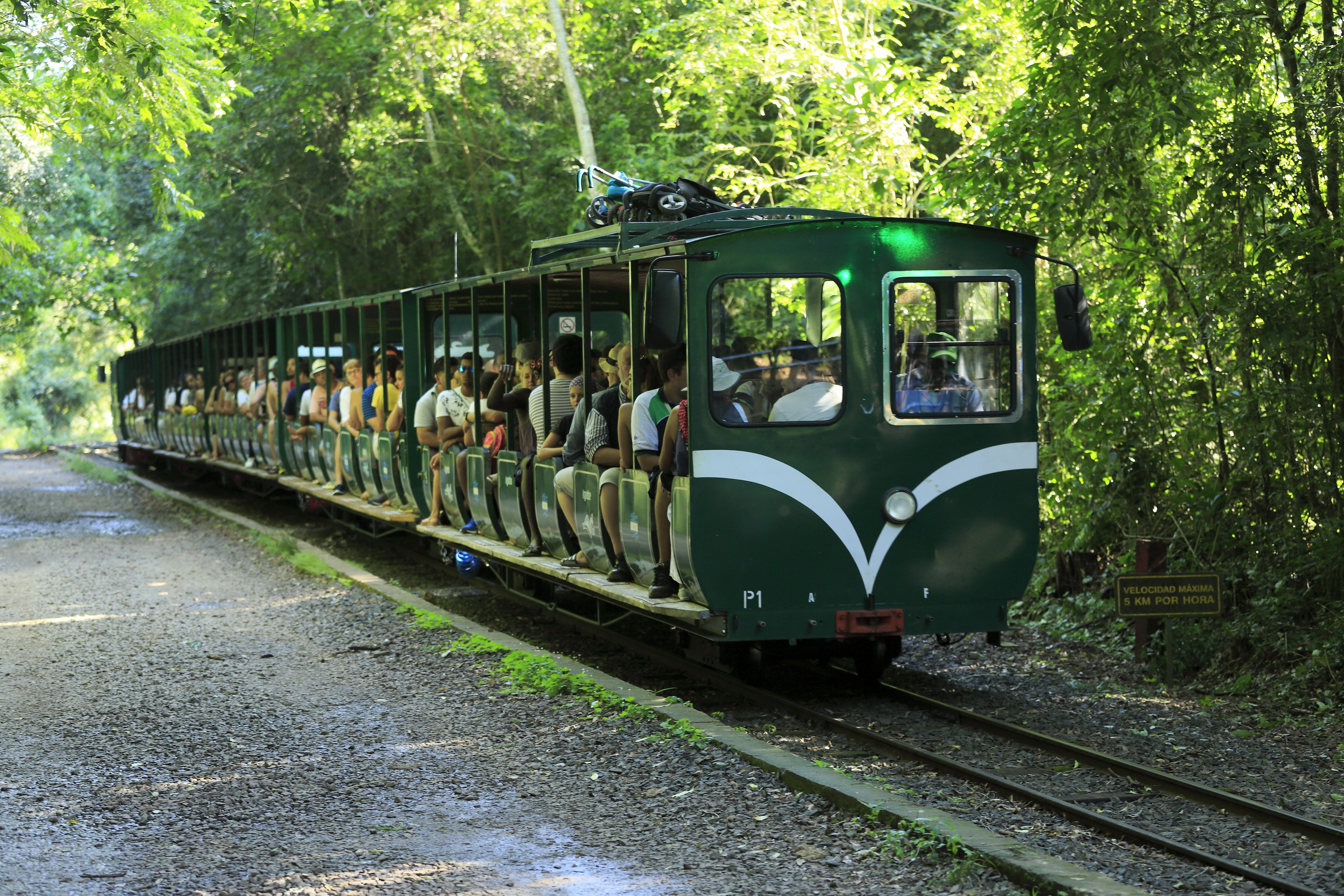 Der Zug kommt von Garganta del Diablo, er befindet sich im eingleisigen Abschnitt zwischen der Kreuzungsstelle und dem Hp Cataratas. In der Regel laufen die Lokomotiven auf der Seite Garganta del Diablo, in Richtung estación central werden die Züge geschoben. Obwohl der Verkehr tagsüber in Cataratas gebrochen wird, verkehren die Züge zum Aufnahmezeitpunkt kurz vor 18.00 durchgehend, um die Besucher zurück zum Eingang (und damit zu den Parkplätzen, soviel zum Thema Ökologie) zu bringen.